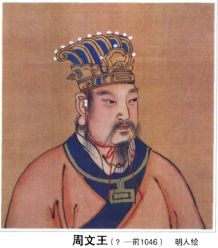 周文王像，明人绘